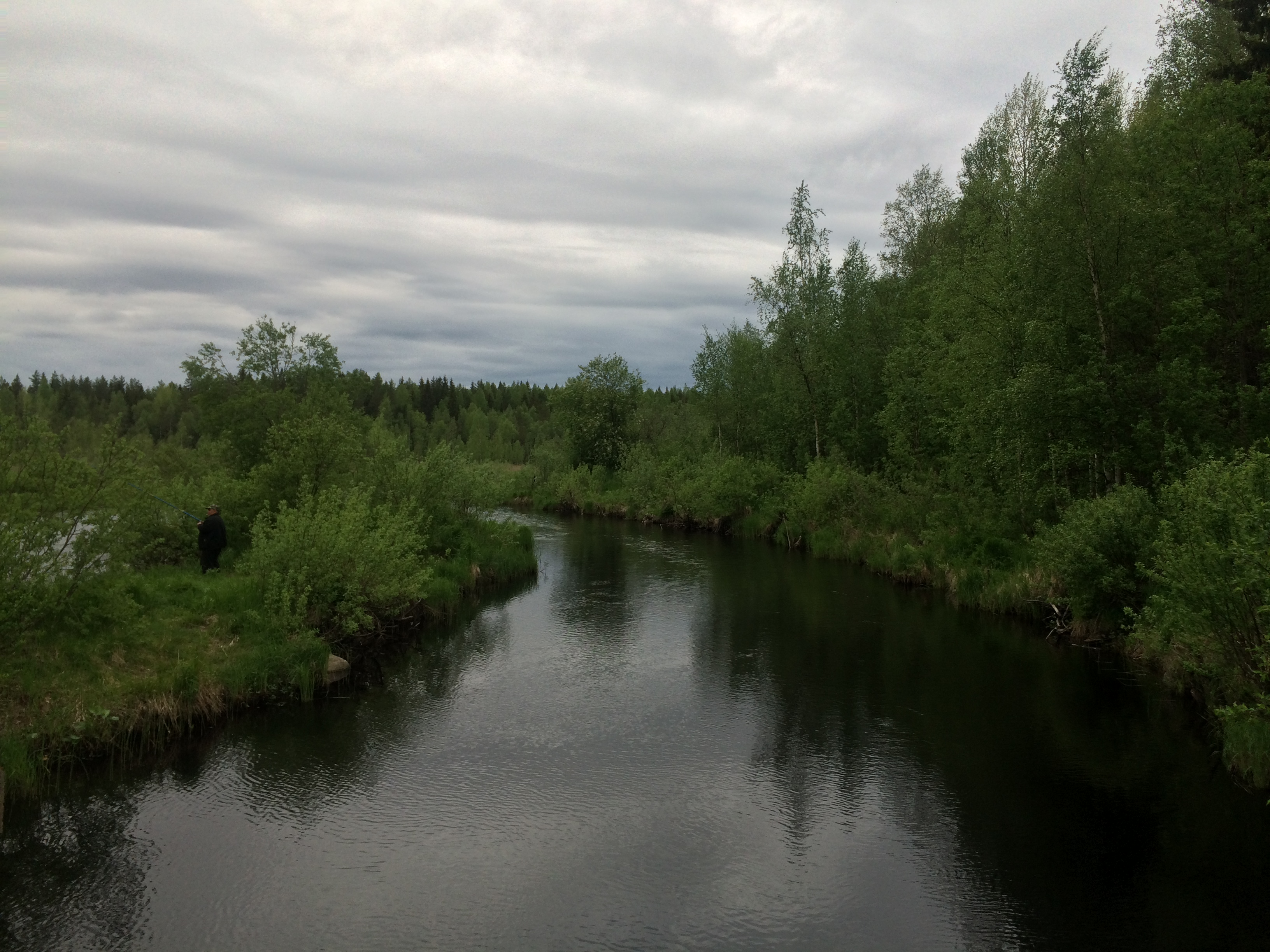 река Задняя (Карелия)